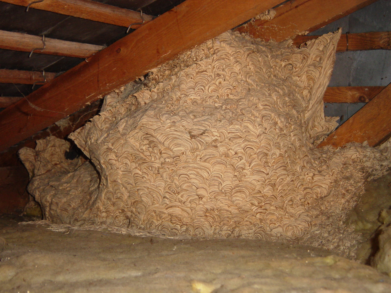 Gros nid de frelons sous combles